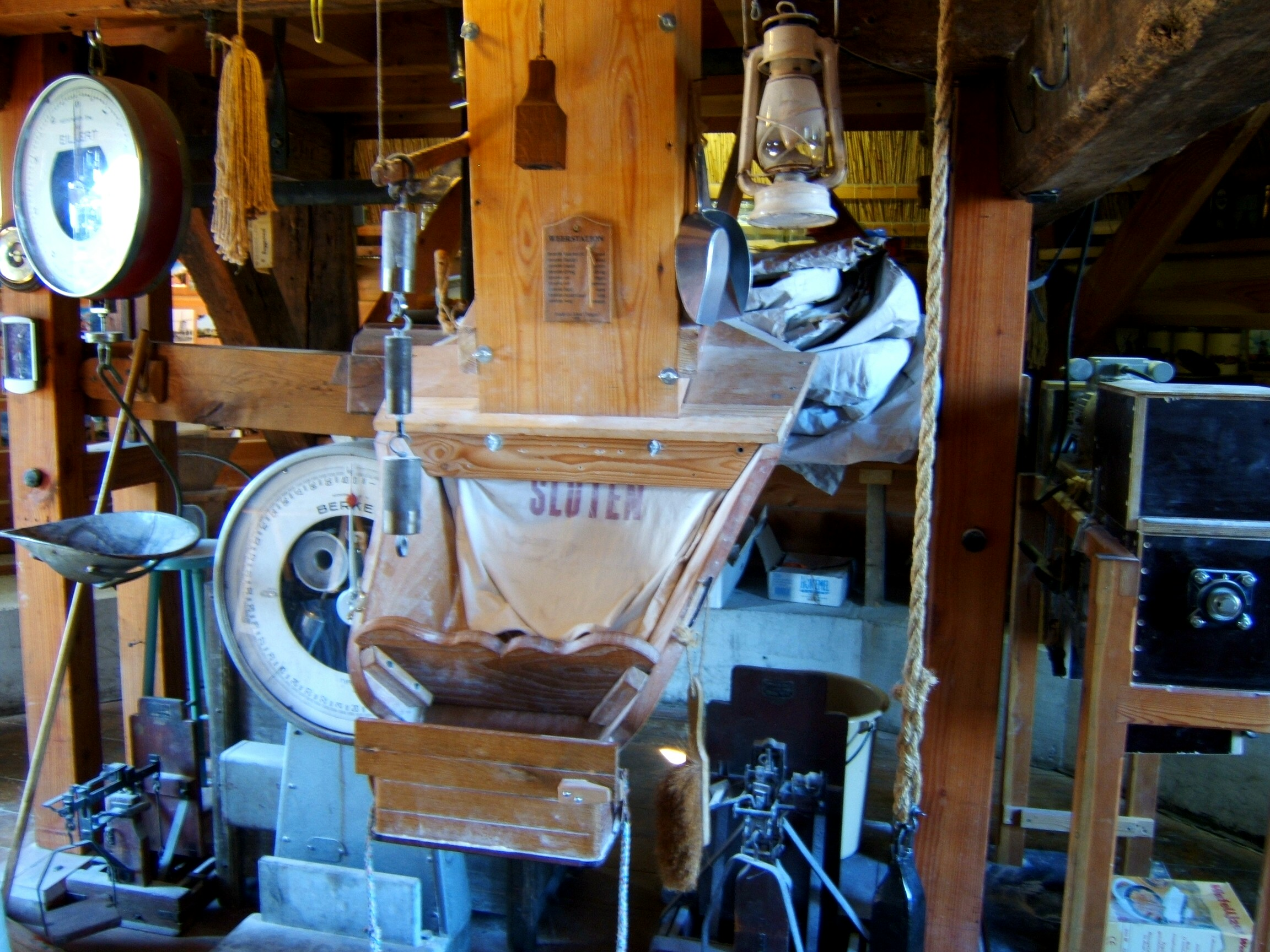 Categorie:Afbeelding molen